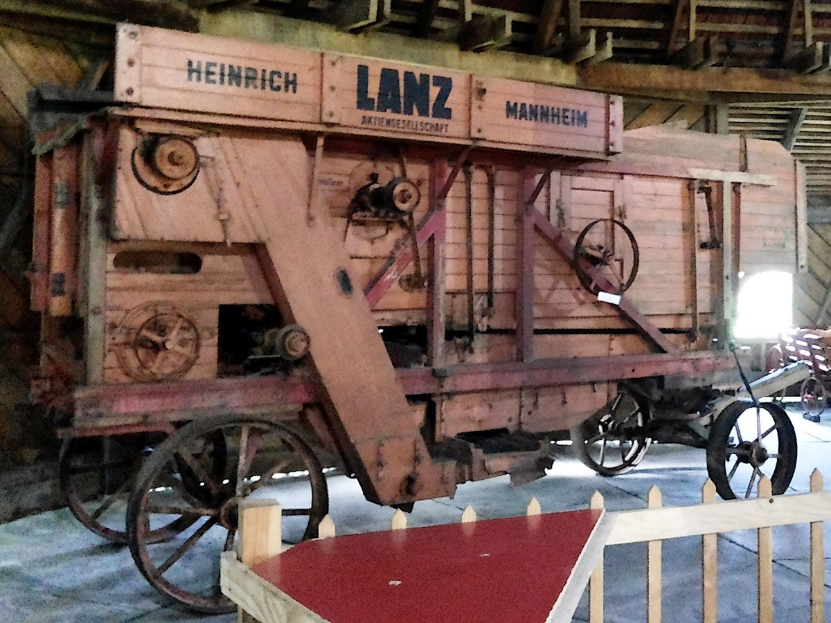 Trilladora estacionaria Lanz (Heinrich Lanz, Mannheim; usada desde 1911) en la sala del campanario del Museo Colonial Alemán de Frutillar, Chile.